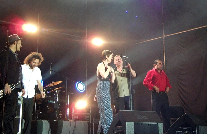 Paris Combo на закрытии Французской Весны 2012 в Киеве